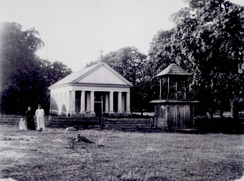 Гарнастаевічы. Сядзіба. Царква (XX)